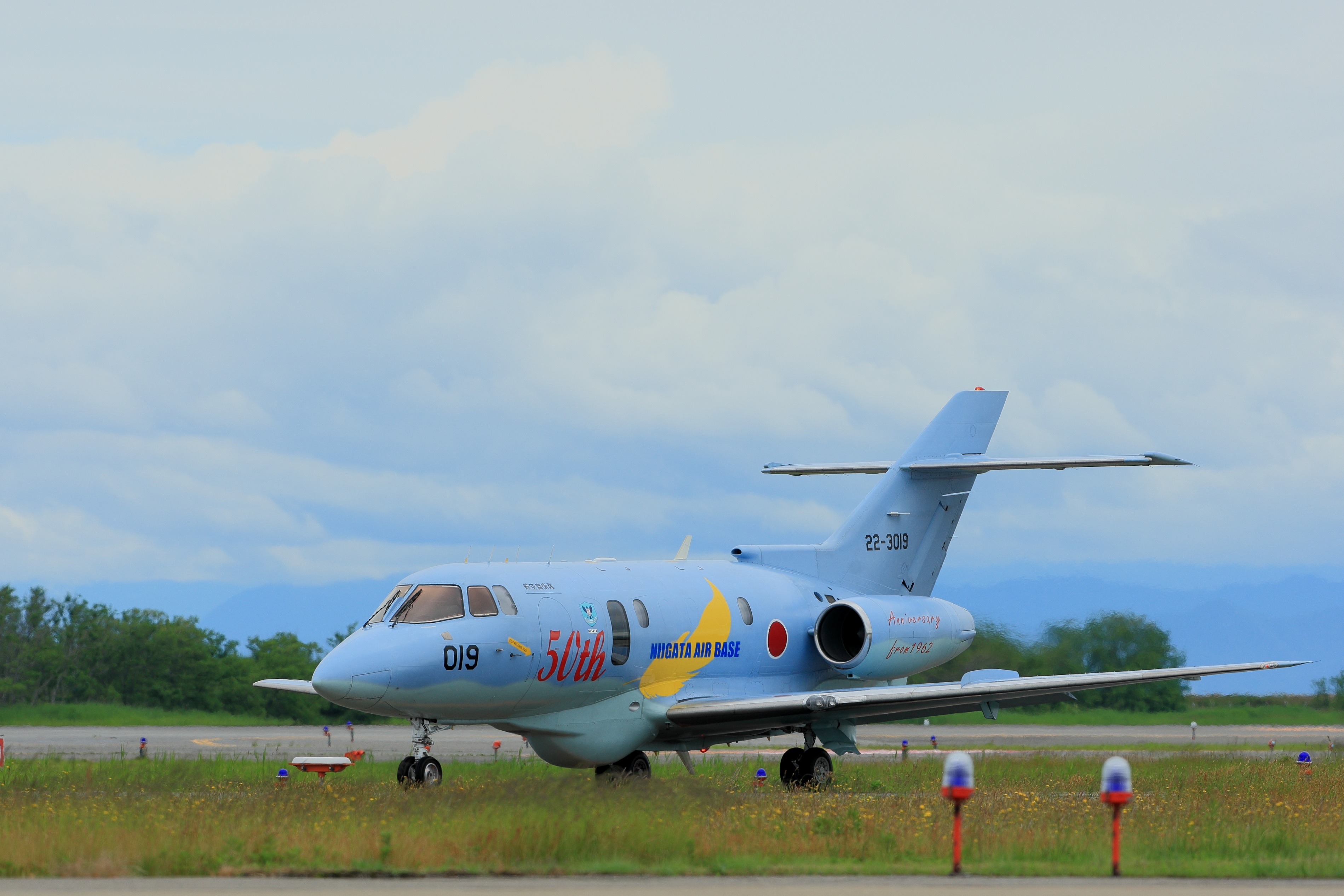 新潟空港で撮影された､航空自衛隊新潟救難隊のU-125A 新潟分屯基地創設５０周年記念塗装機